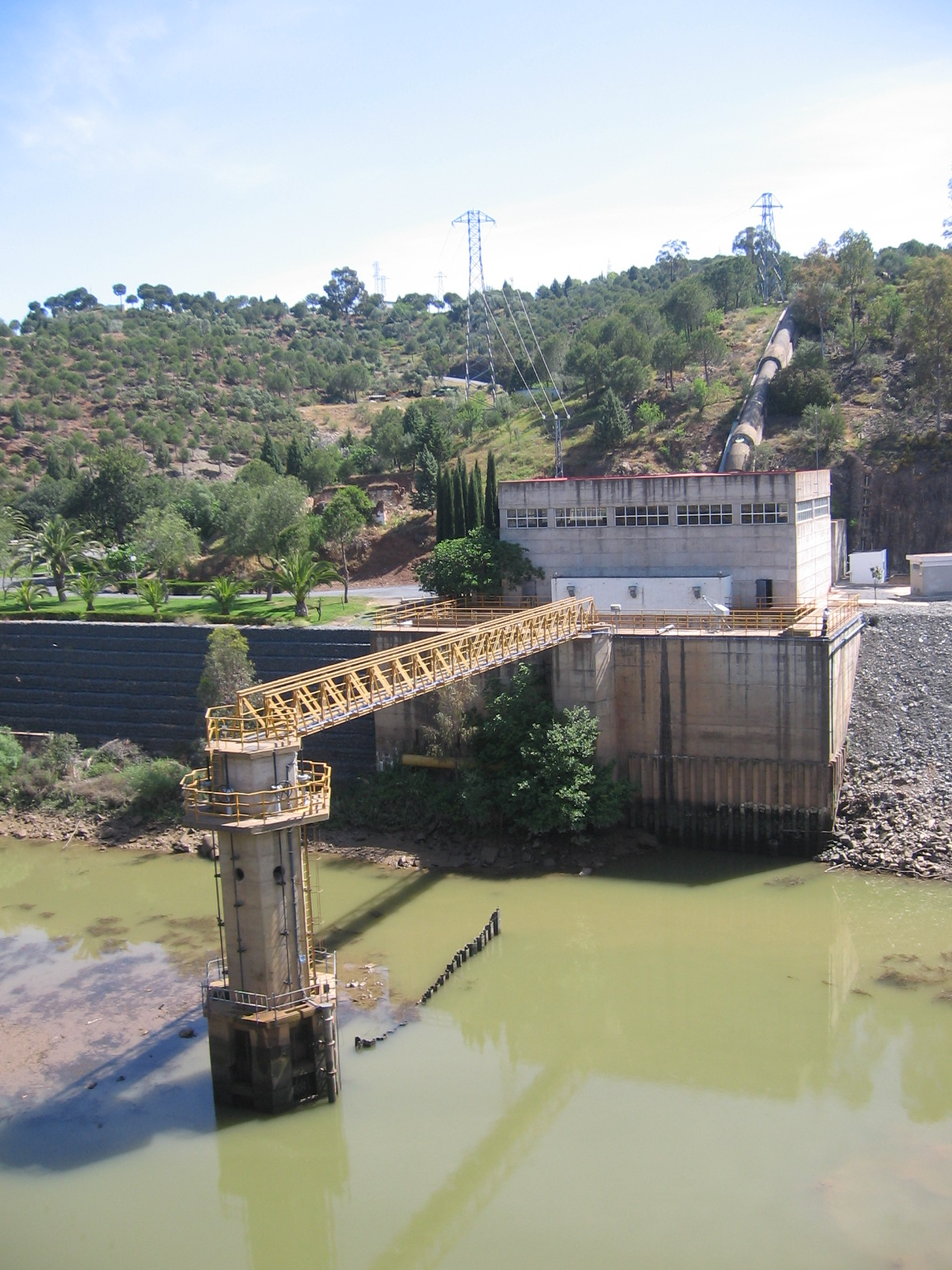 Estação de bombagem na confluência do Chança e do Guadiana, a jusante da barragem do Chança